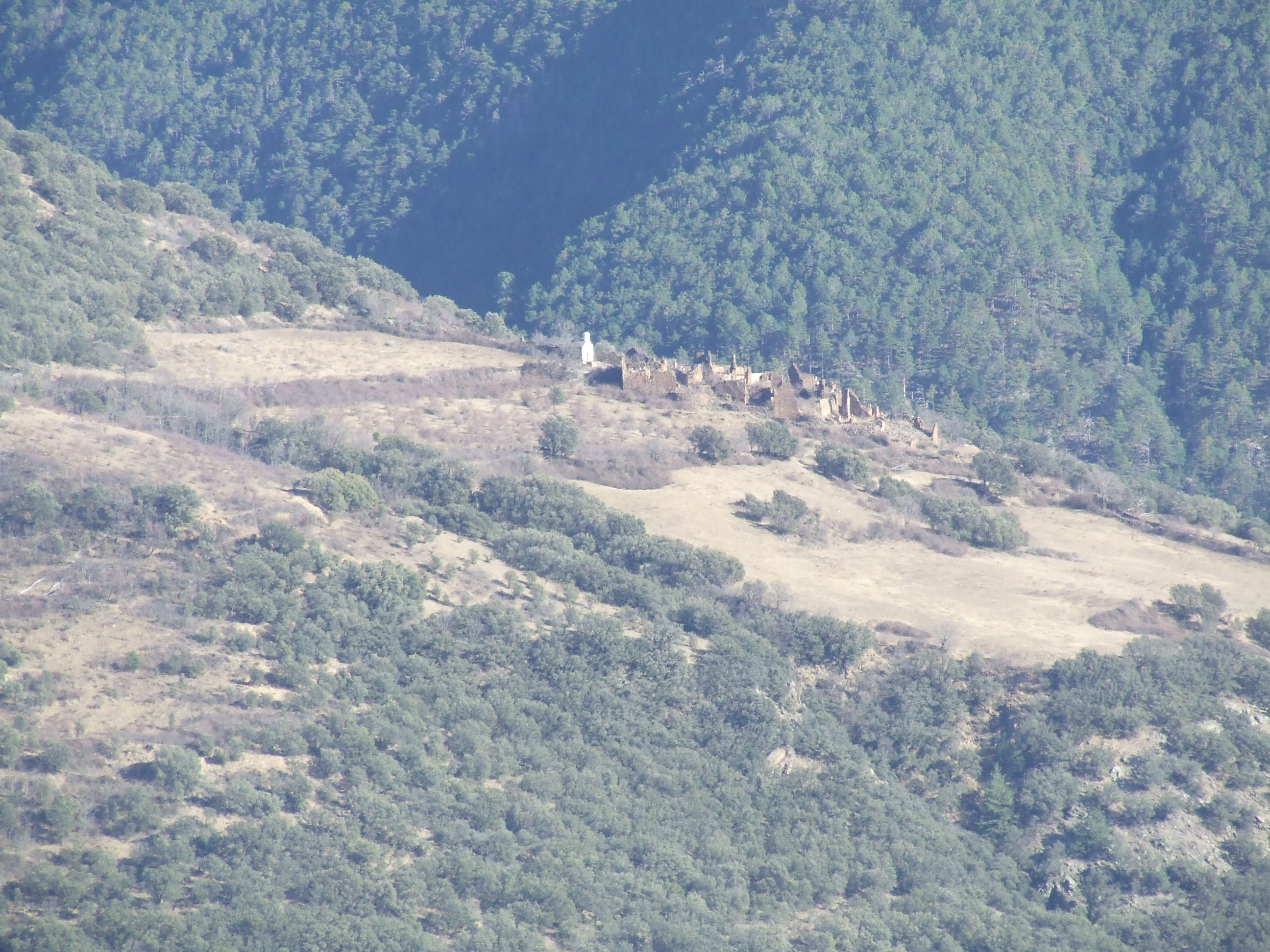 Pernui (Sort, Pallars Sobirà)